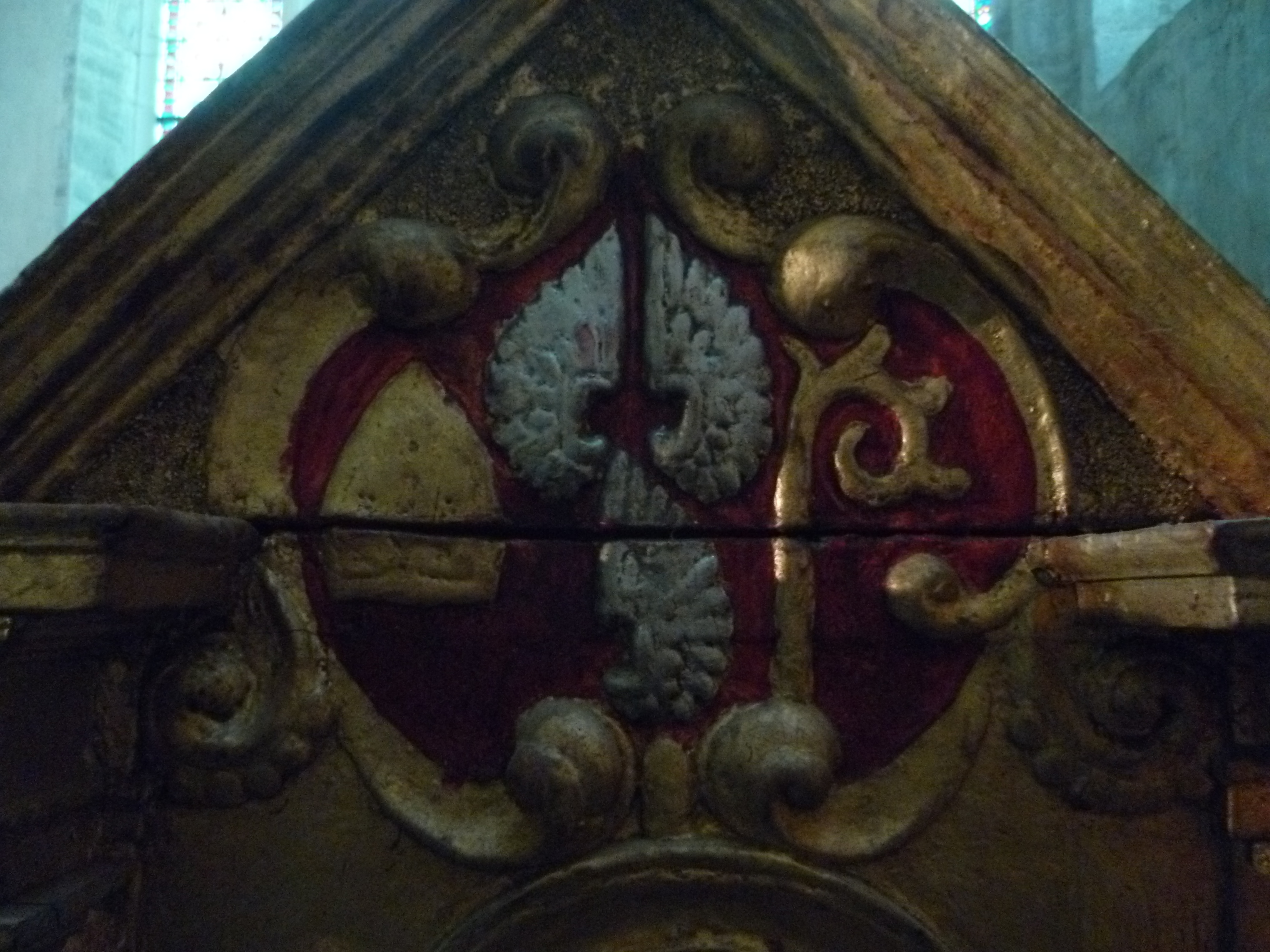 Blason de Jean de Watteville sur les reliquaires encadrant le retable